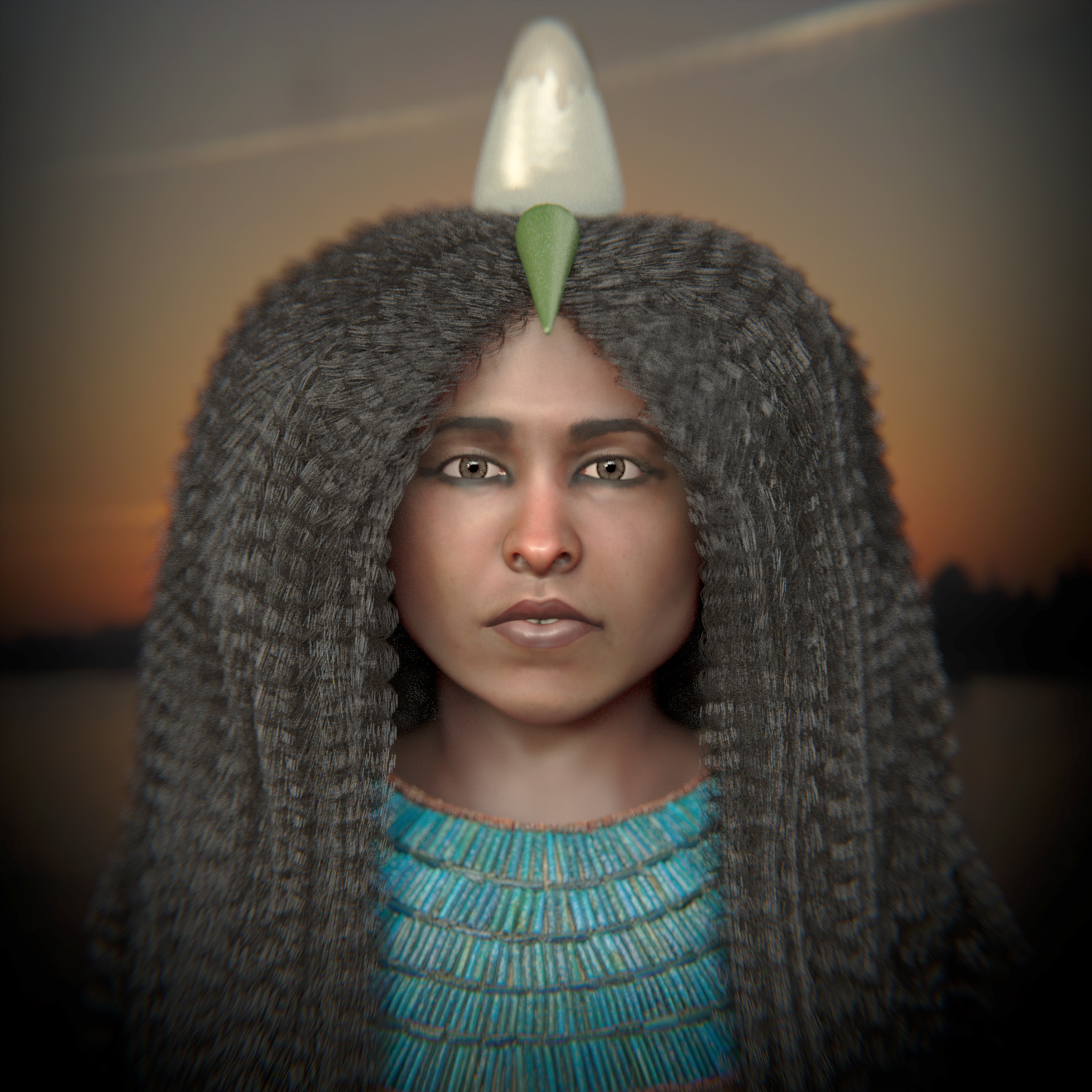 Reconstrução facial forense efetuada para o projeto Tothmea+6, uma parceria do Museu Egípcio Rosacruz, do arqueólogo Dr. Moacir Elias Santos e do 3D designer Cícero Moraes.